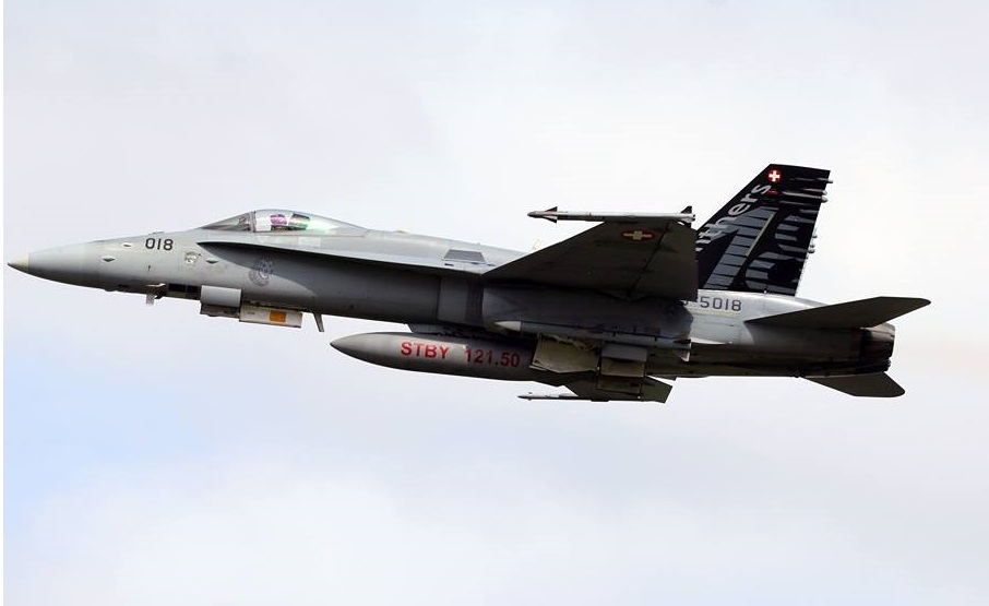 F/A-18C J-5018 der Schweizer Luftwaffe macht einen QRA Start/Live-Mission oder Hot-Mission Einsatz. Das Flugzeug ist mit Sidewinder und Amraams bewaffnet und trägt einen Zusatztank mit aufgemalter Notfrequenz (121,5 MHz). Die F/A-18C J-5018 ist die Staffelmaschine der Fliegerstaffel 18.